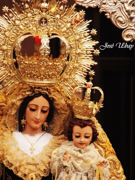 Nuestra Señora del Carmen (La Isleta)